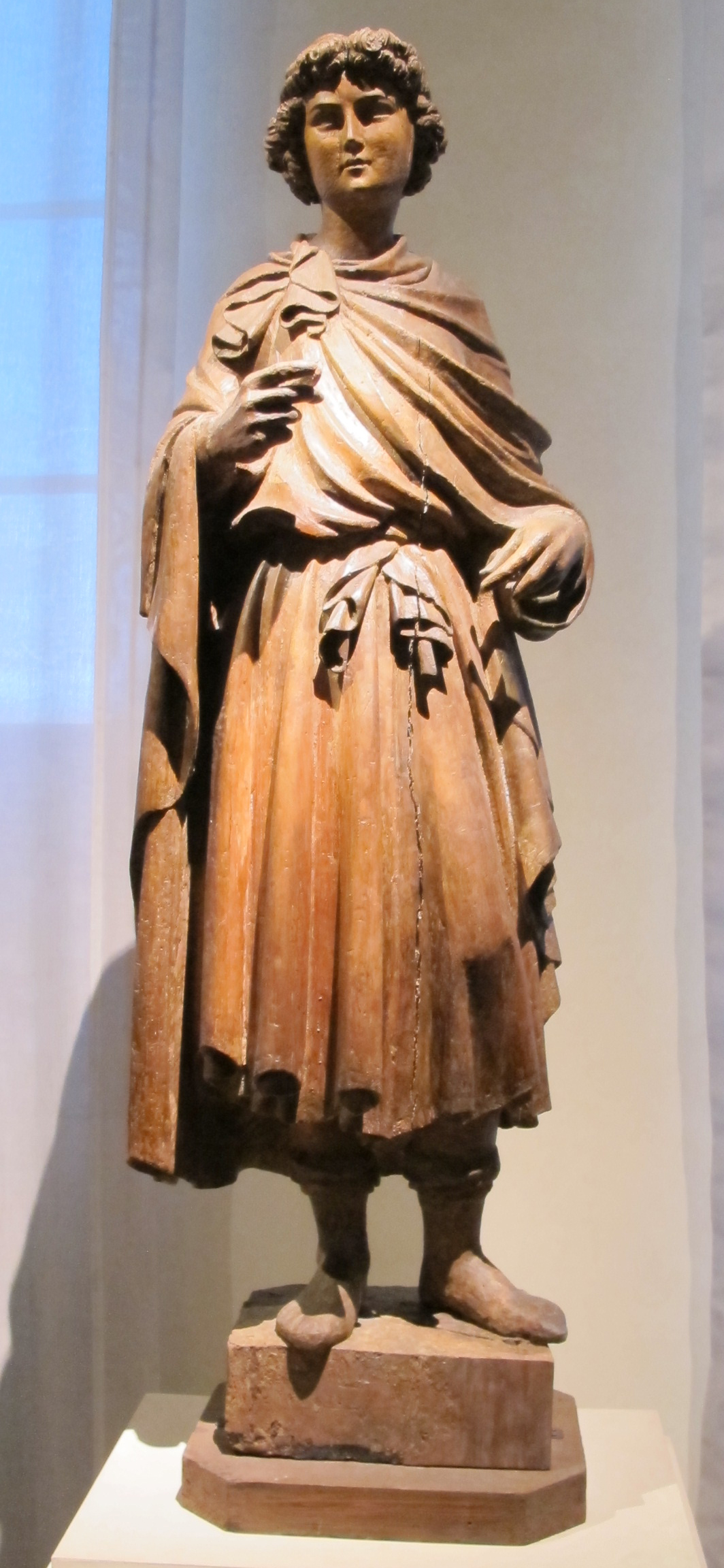 Museo nazionale di Villa Guinigi - MIBAC This is a photo of a monument which is part of cultural heritage of Italy.